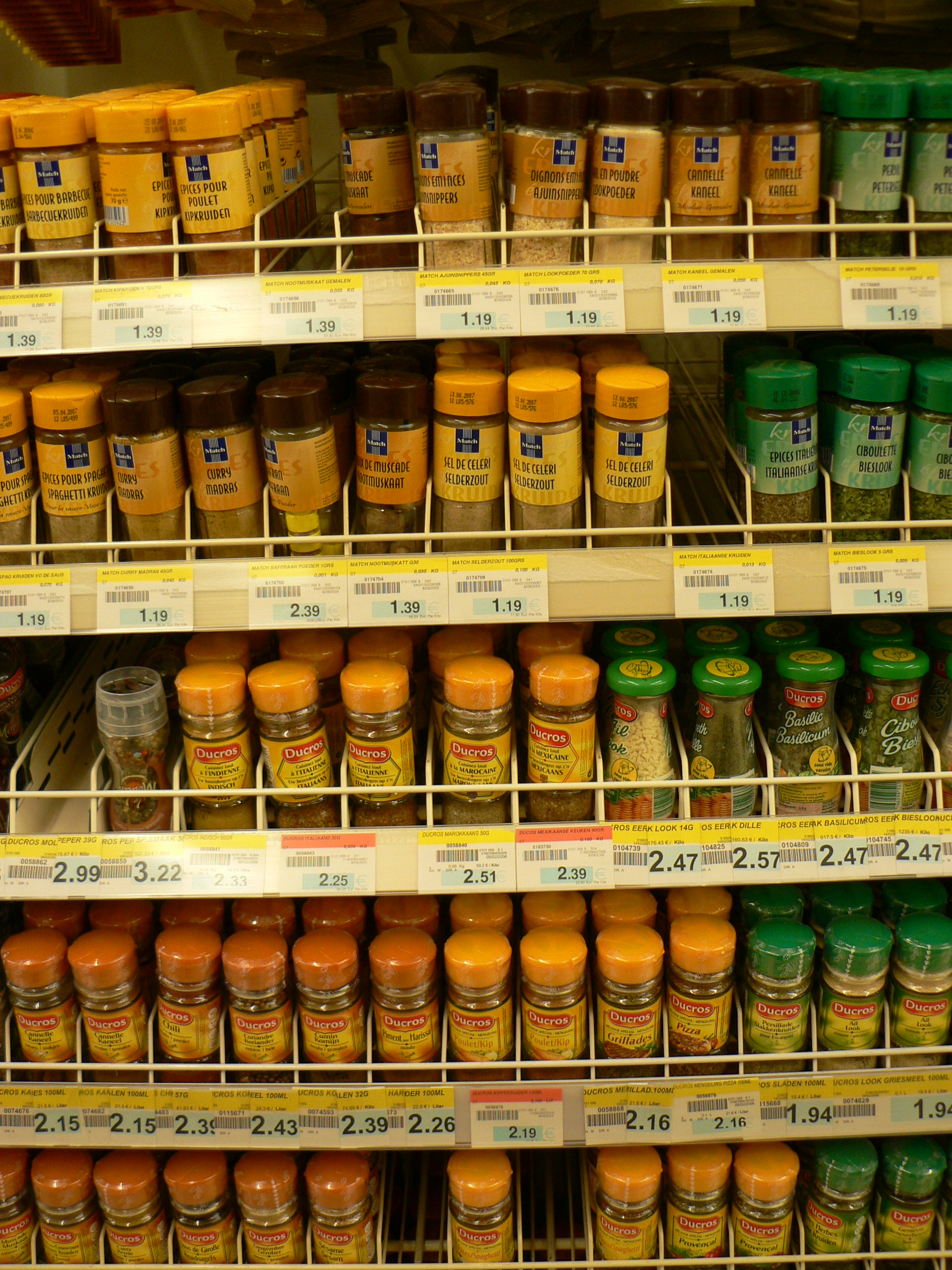 Smatch supermarket, Deerlijk, Belgium